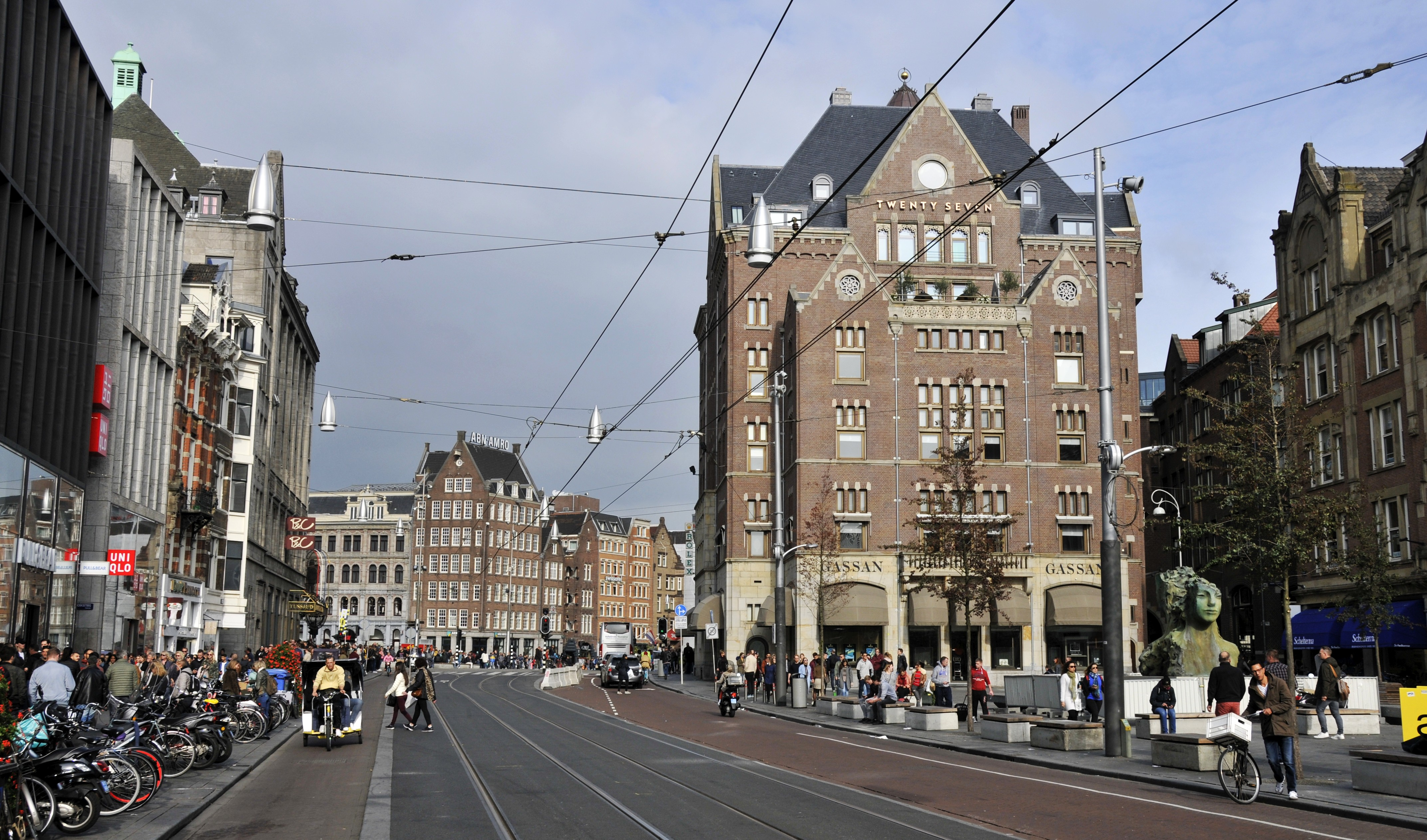 Foto gemaakt op het Rokin, Amsterdam staande op de trambaan en kijkend richting Dam.